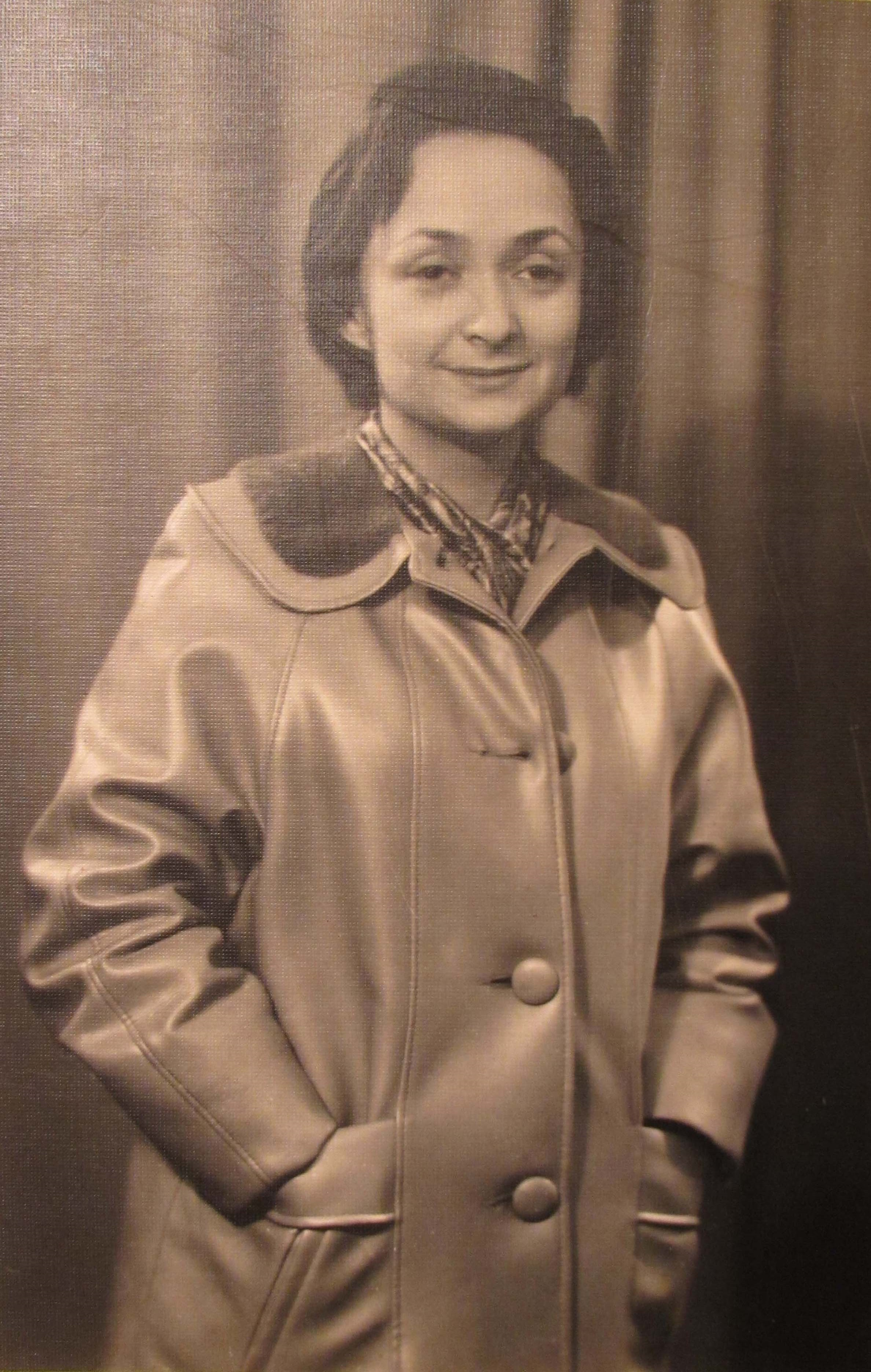 נחמה ליפשיץ בצעירותה